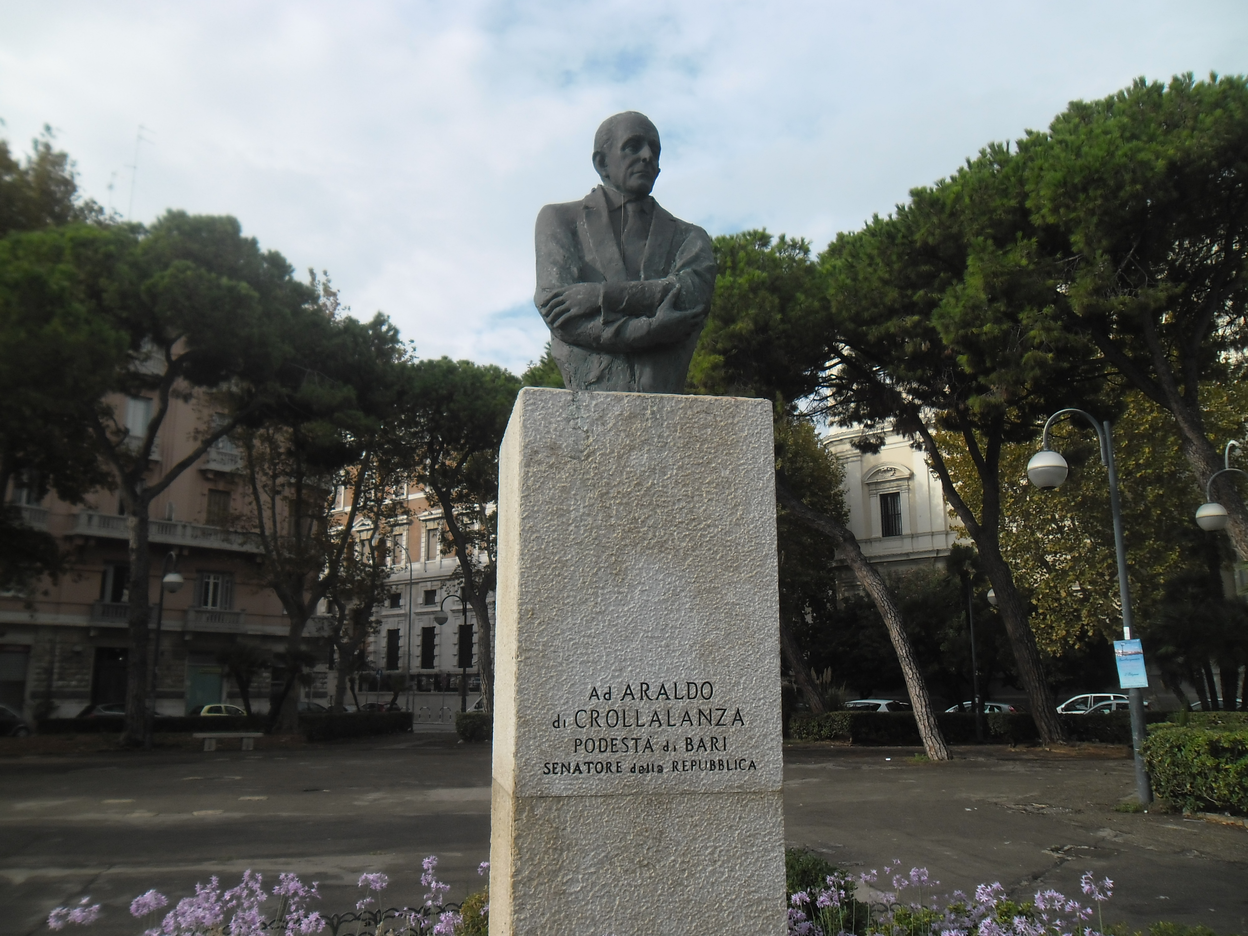 Bari, Italija